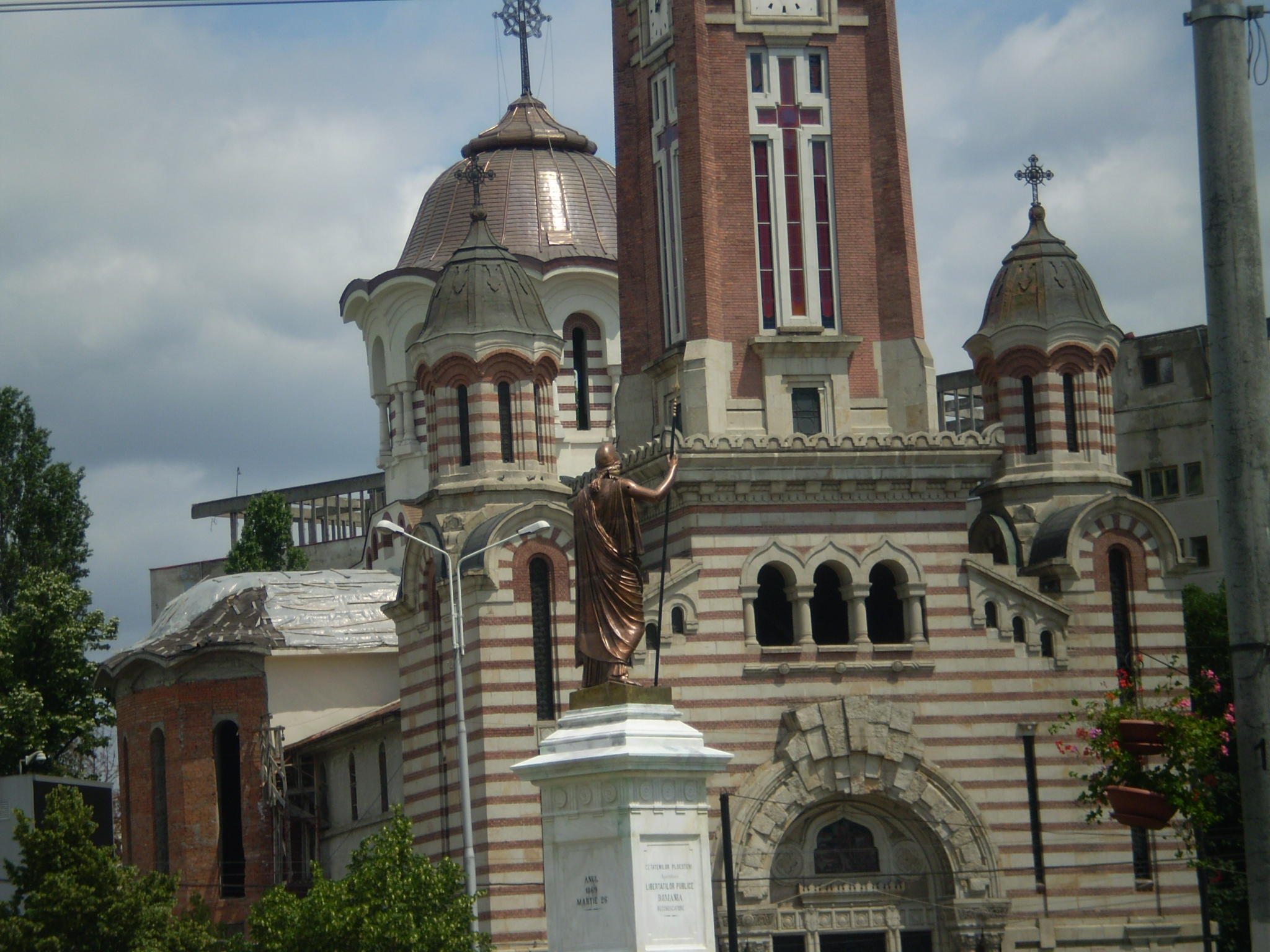 Statuia Libertăţii şi Catedrala Sfântul Ioan Botezătorul din Ploieşti